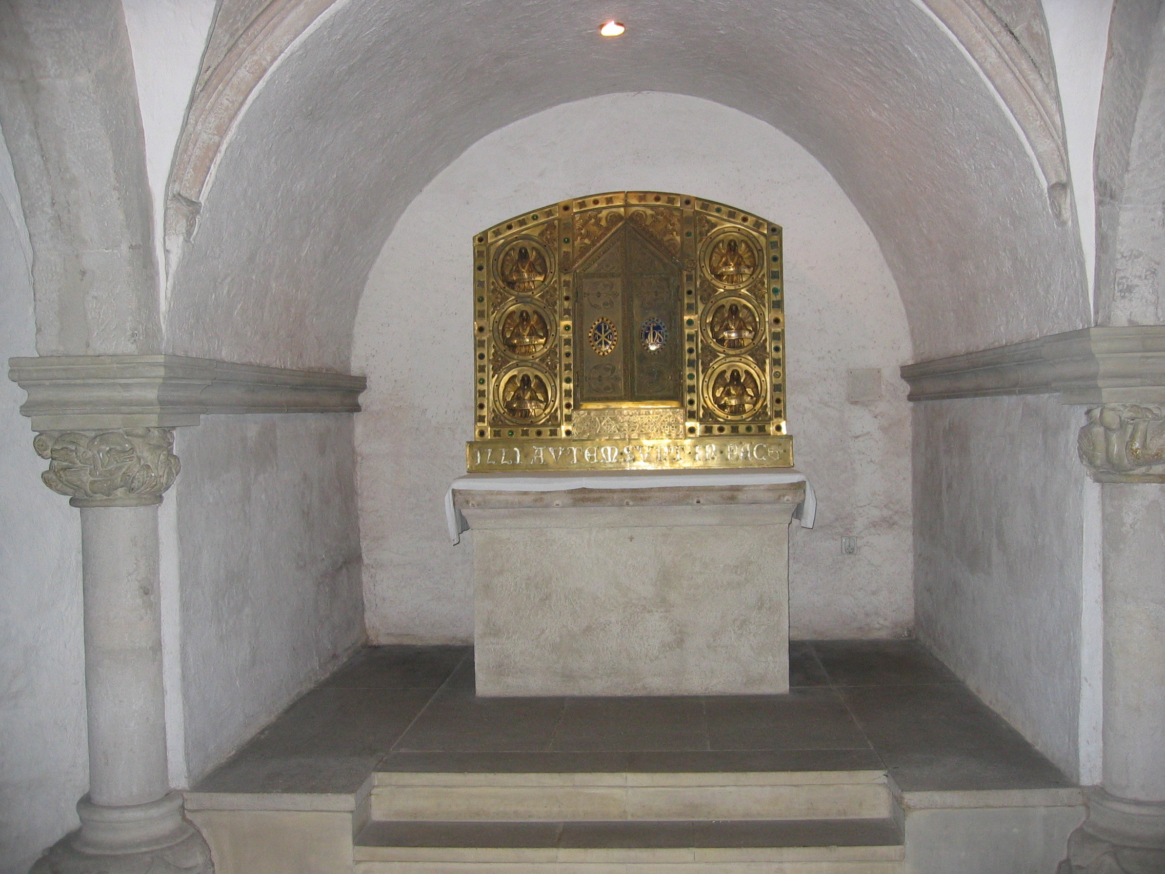 Schrein mit den Reliquien der 16 Stiftsheiligen in der Krypta der Basilika